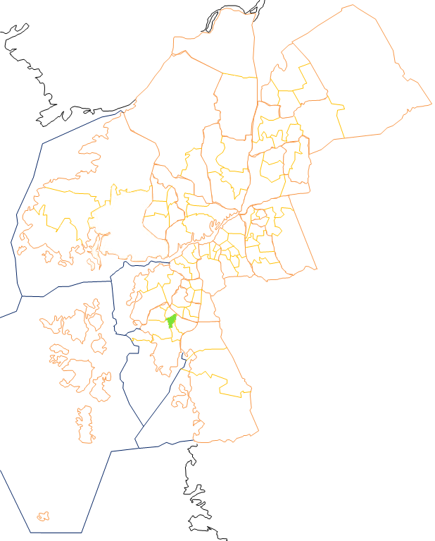 Karta som visar primärområdes belägenhet i Göteborg